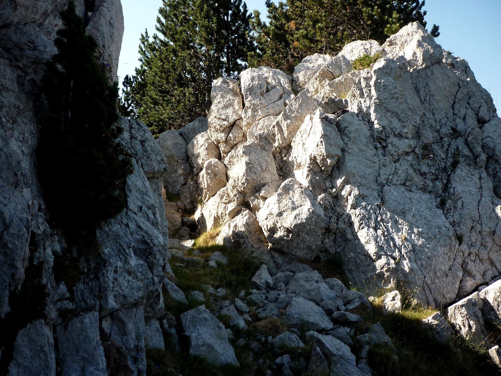 El Portell del Llop a la Costa de les Feixienes. Odèn (Solsonès - Catalunya)